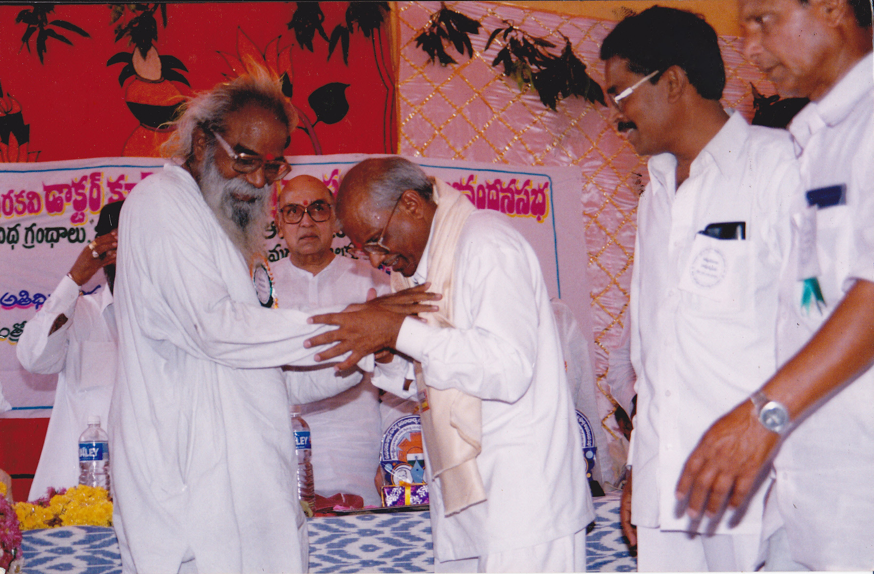 భరద్వాజగారు